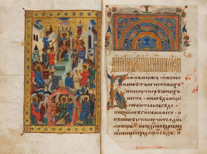 «Псалтирь с восследованием». Рукописная книга «Псалтирь с восследованием» датируется серединой XVI века. Она написана на западноевропейской бумаге изысканным каллиграфическим полууставом, украшена заставками и инициалами роскошного «неовизантийского» орнамента на золотом фоне. В начале Псалтири – миниатюра с надписью белилами на золотом фоне: «Давид царь состави Псалтирь с лики богодухновенными писмены со многими творцы». Иконография миниатюры уникальна: помимо царя Давида и традиционных «ликов» (хоров) музыкантов и певцов, исполняющих псалмы, здесь в золотых нимбах изображены и другие царственные авторы песнопений, входящих в состав Псалтири. Разнообразие форм архитектурных сооружений воссоздает сказочный образ священного «града Иерусалима».